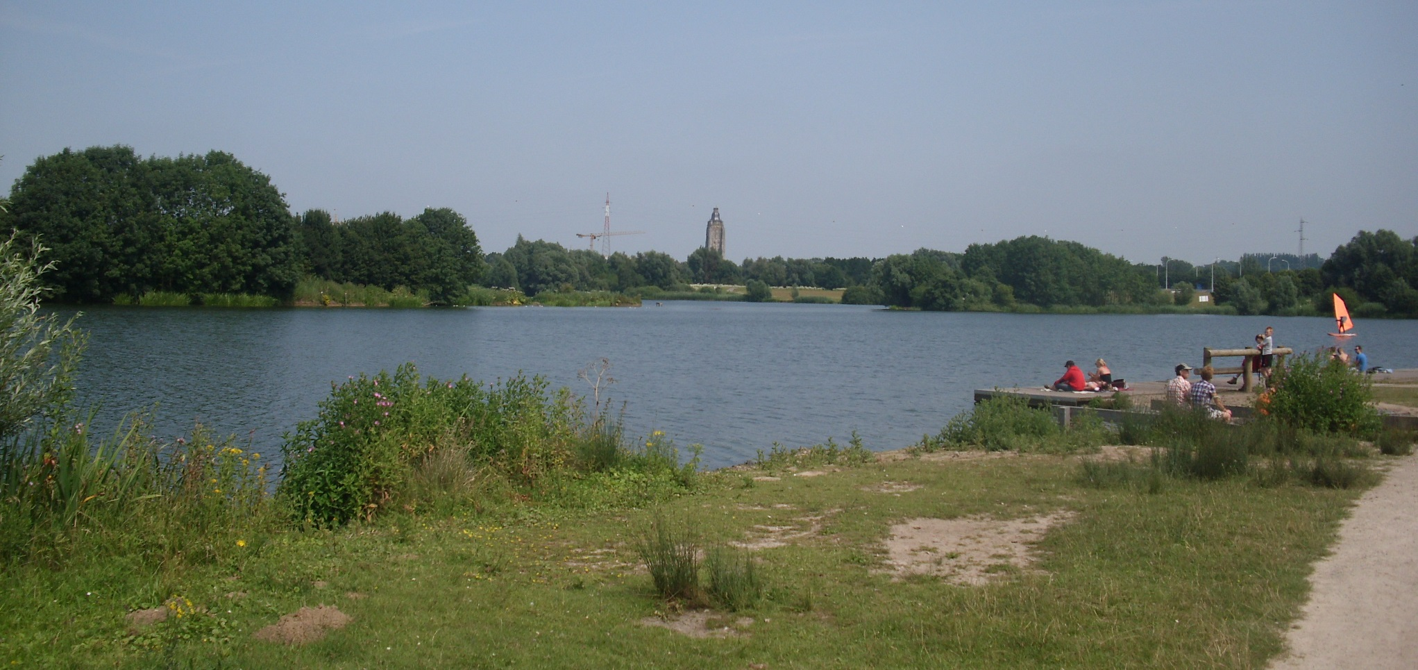 De Donk - Oudenaarde - Oost-Vlaanderen - België